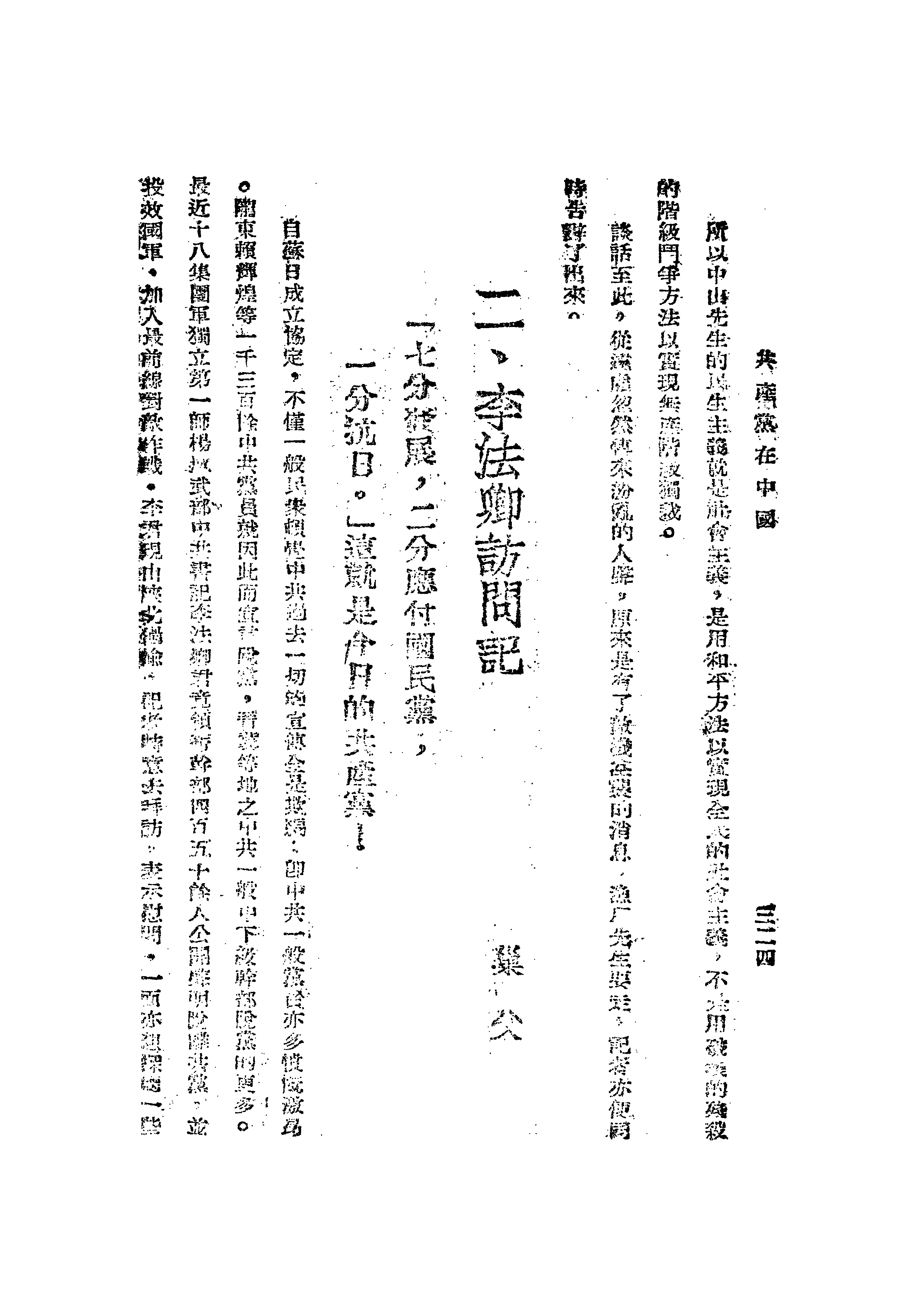 中文（台灣）: 李法卿訪問記，述及共產黨一分抗日部分。依據 經濟部商業司營業登記之查詢結果，華嚴出版社已於2004年6月歇業(終止營業) 承上，根據中華民國著作權法第42與第43條規定，屬於自由利用範圍。 本書公開出版日為1943年7月。